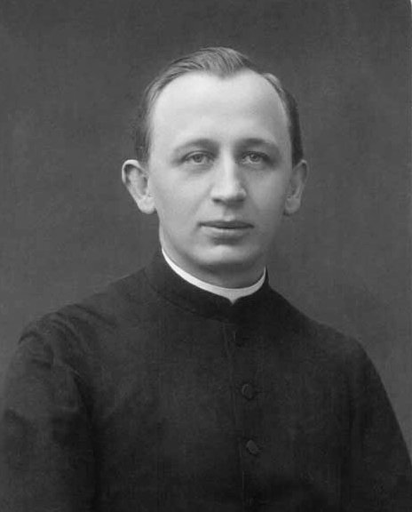 Joseph Wittlig